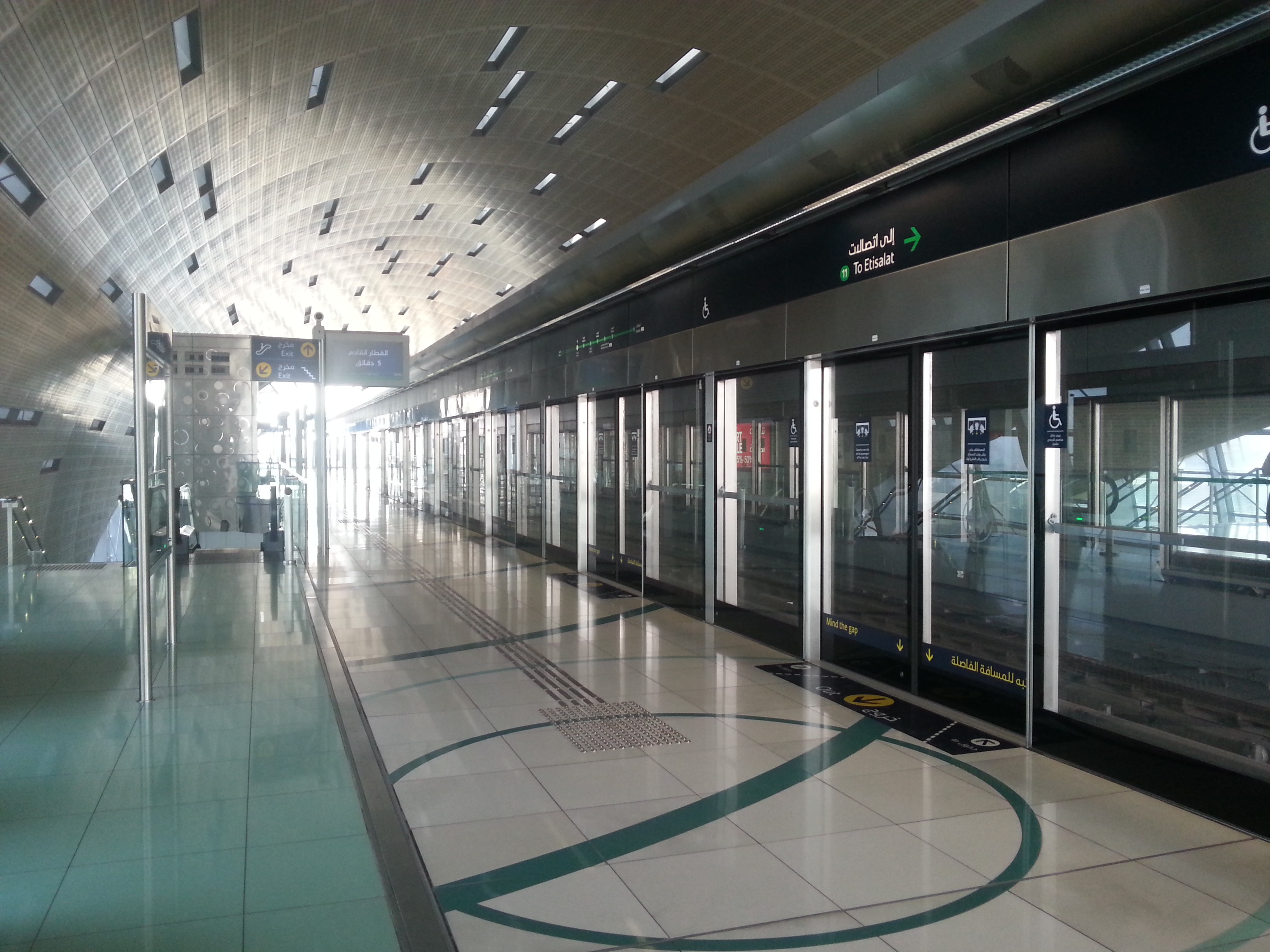 of Abu Hail, Dubai.